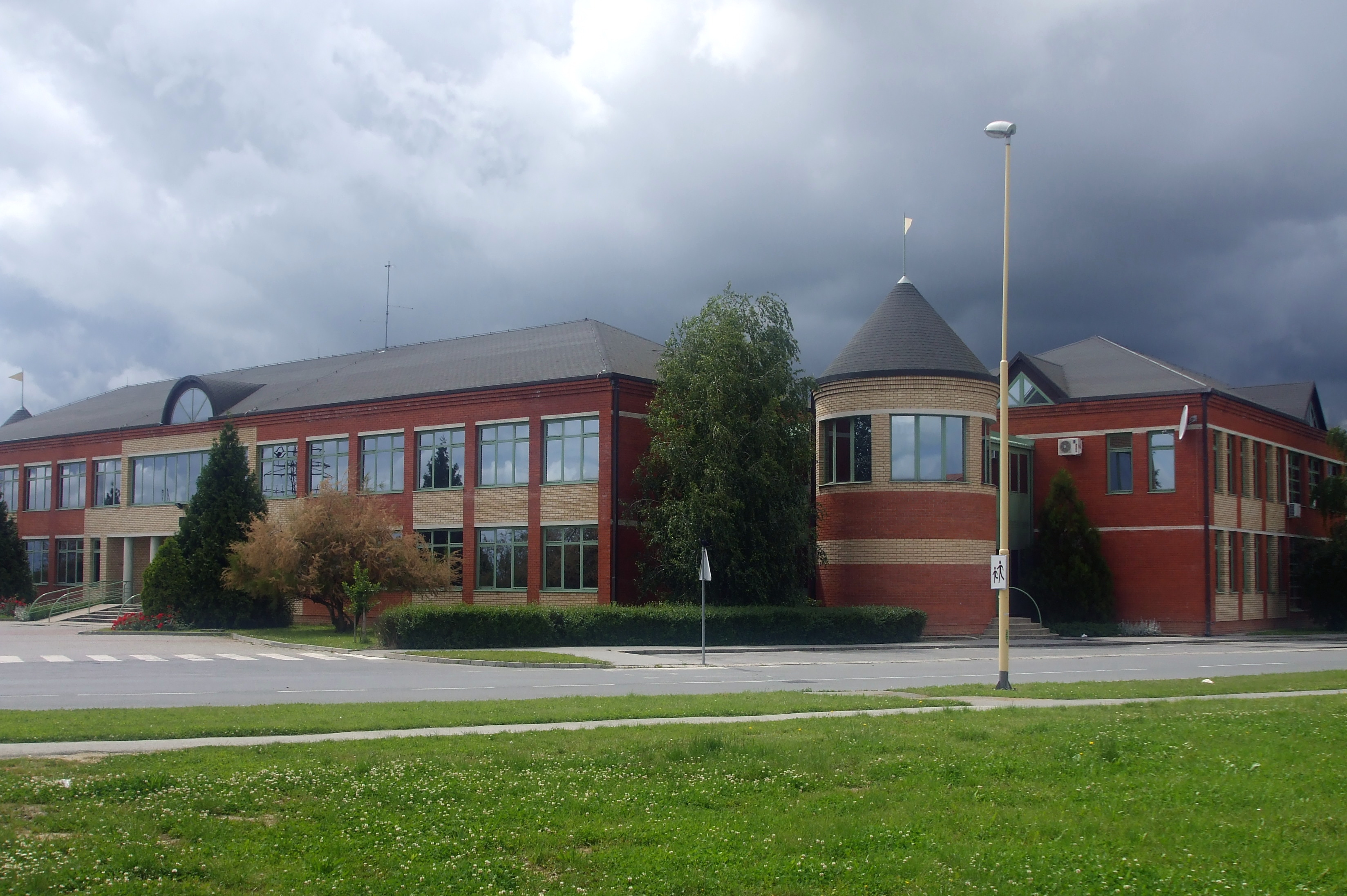 Prosvjetno-kulturni centar Mađara u Hrvatskoj u Gackoj ulici u Osijeku.